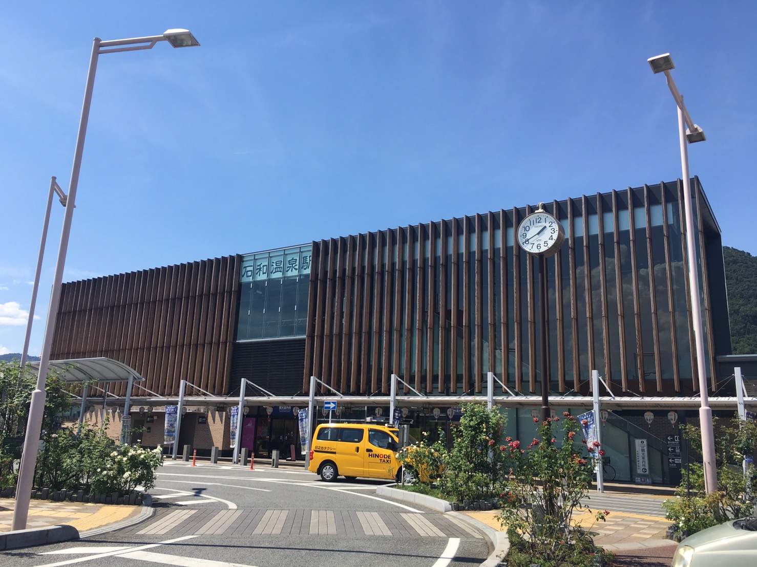 石和温泉駅